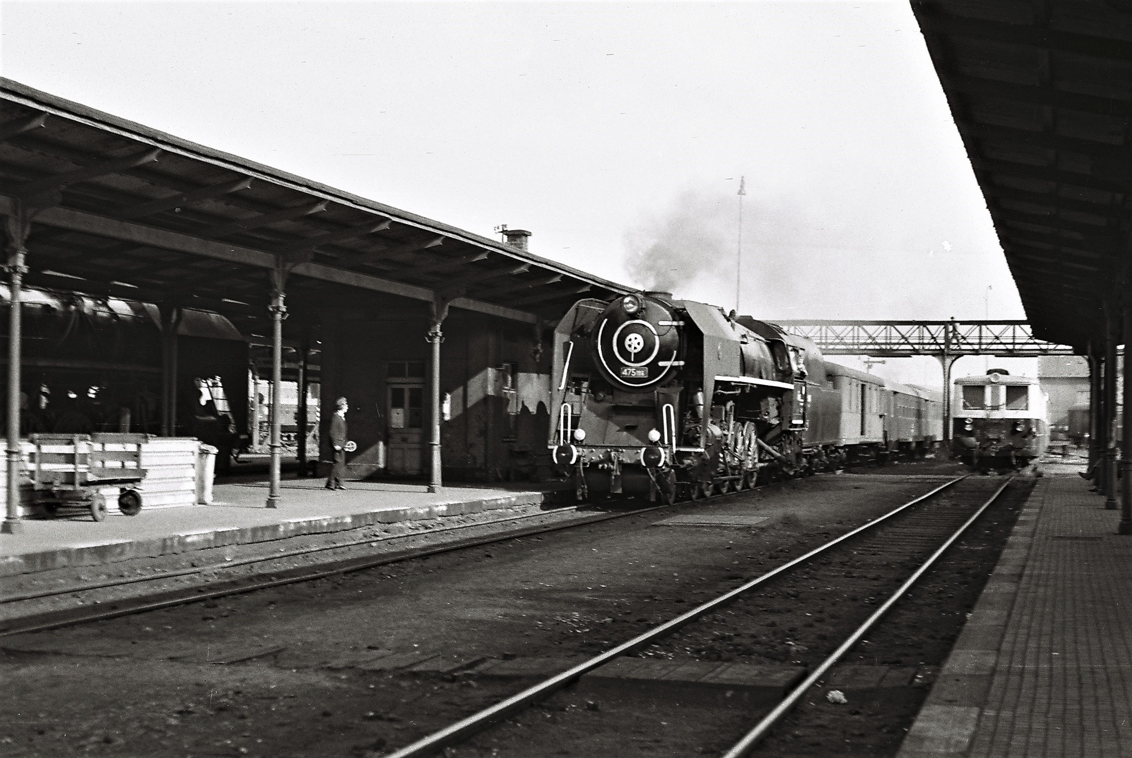 Historische Aufnahme eines Schnellzuges, gezogen von einer Lokomotive der Reihe 475.1 in Liberec...